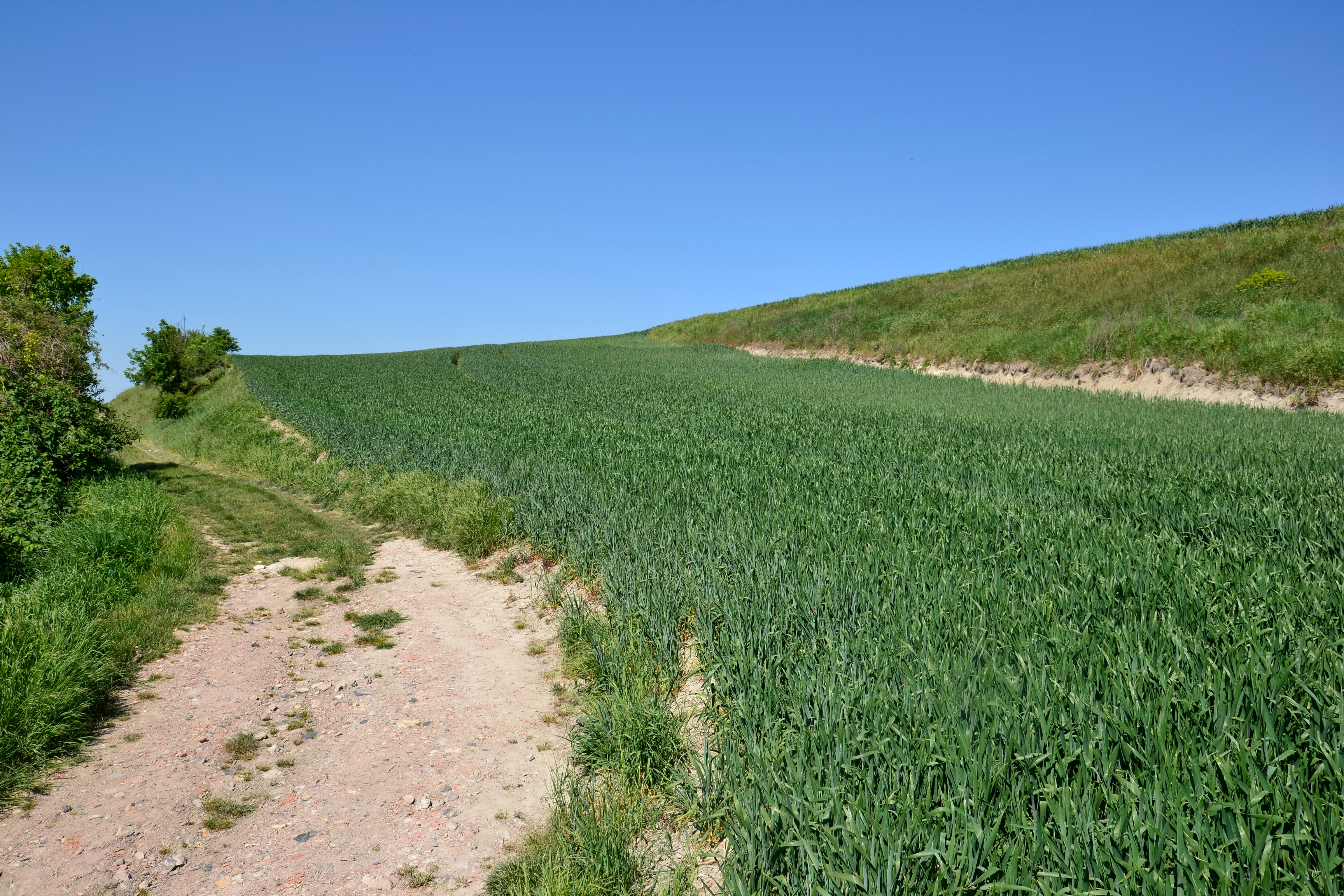 Poplze – terasy na jižním okraji hradiště